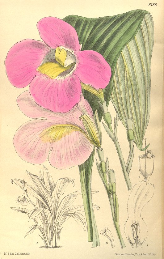 Siphonochilus kirkii (Hook.f.) B.L.Burtt Planche 8188 du Curtis's Botanical Magazine Vol 134 année 1908 sous le nom de Kaempferia kirkii var. elatior